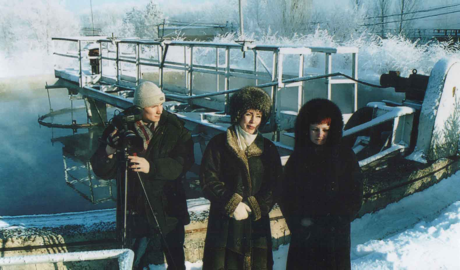 Андрей Думчев и Елена Волчатникова